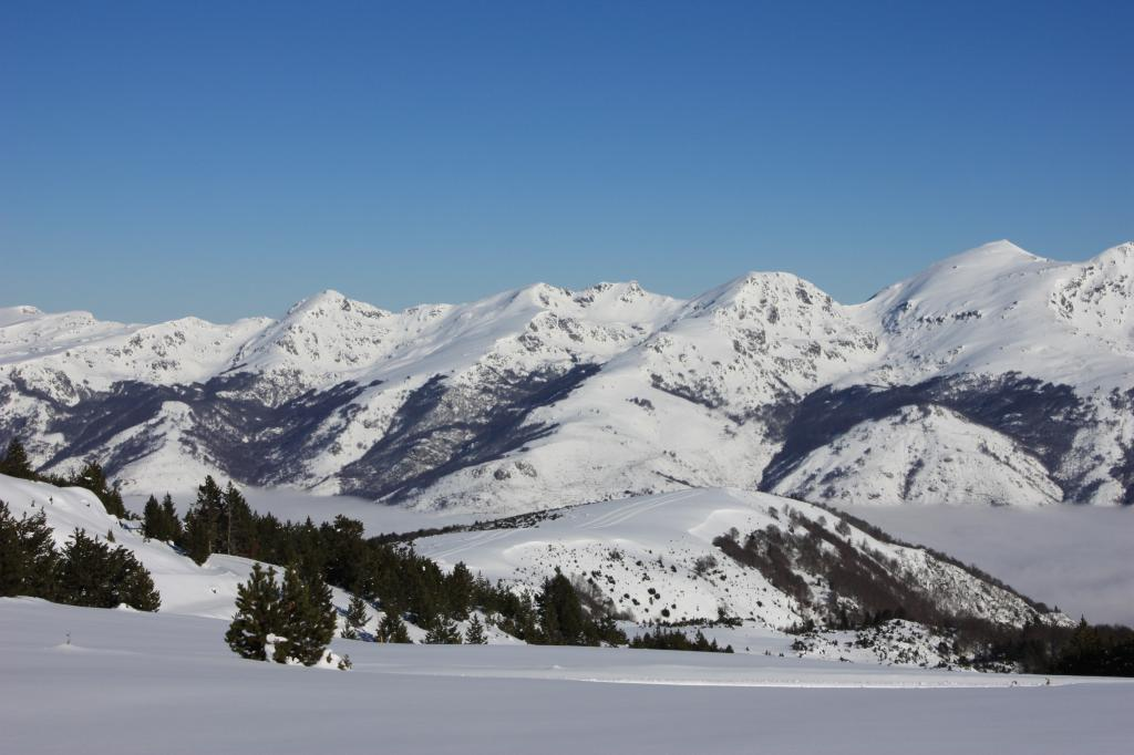 Vue sur le Plateau de Beille enneigéGalerie photo